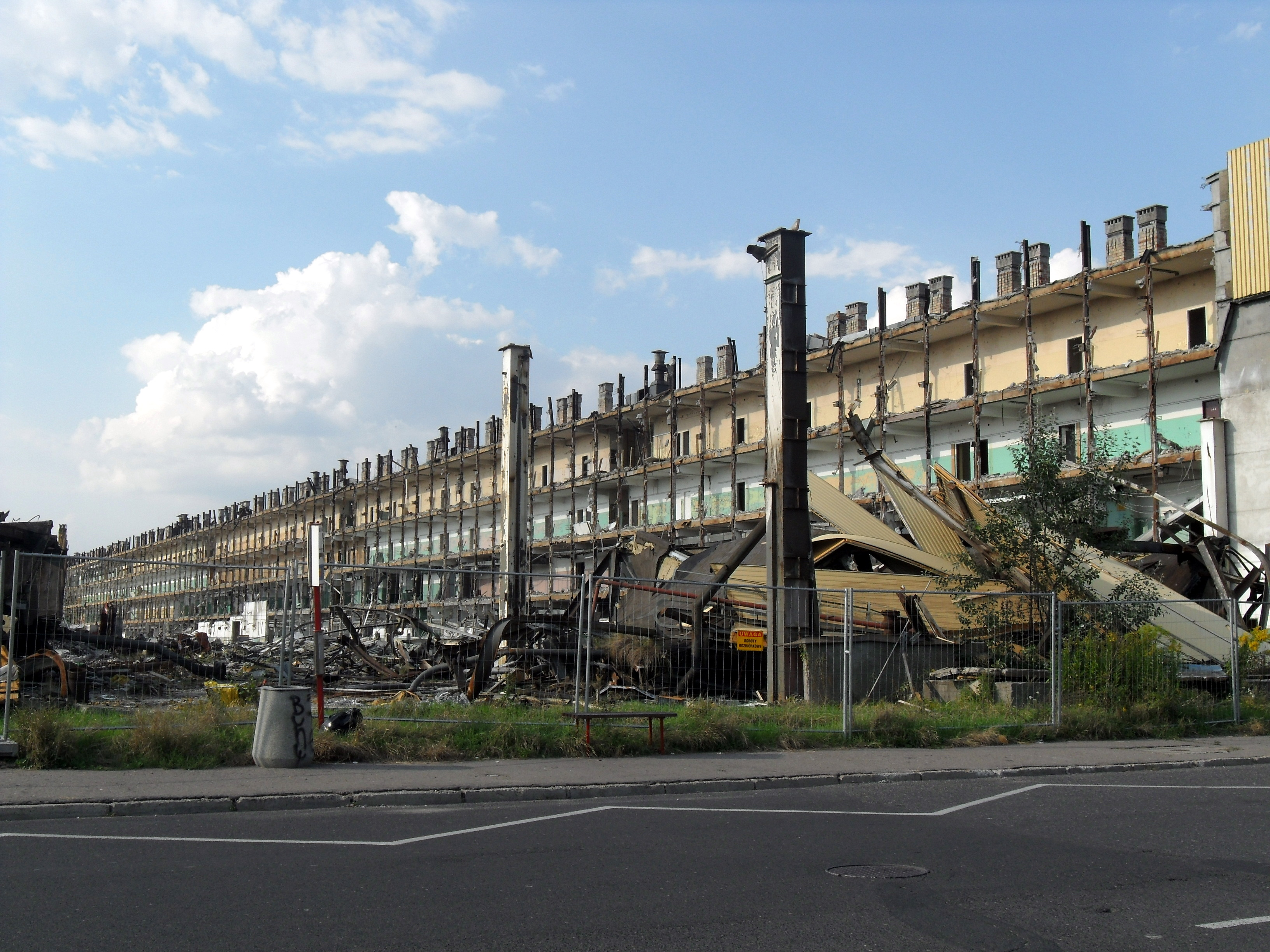 Dawne budynki zakładów mechanicznych w Ursusie przy ul. Posag 7 Panien